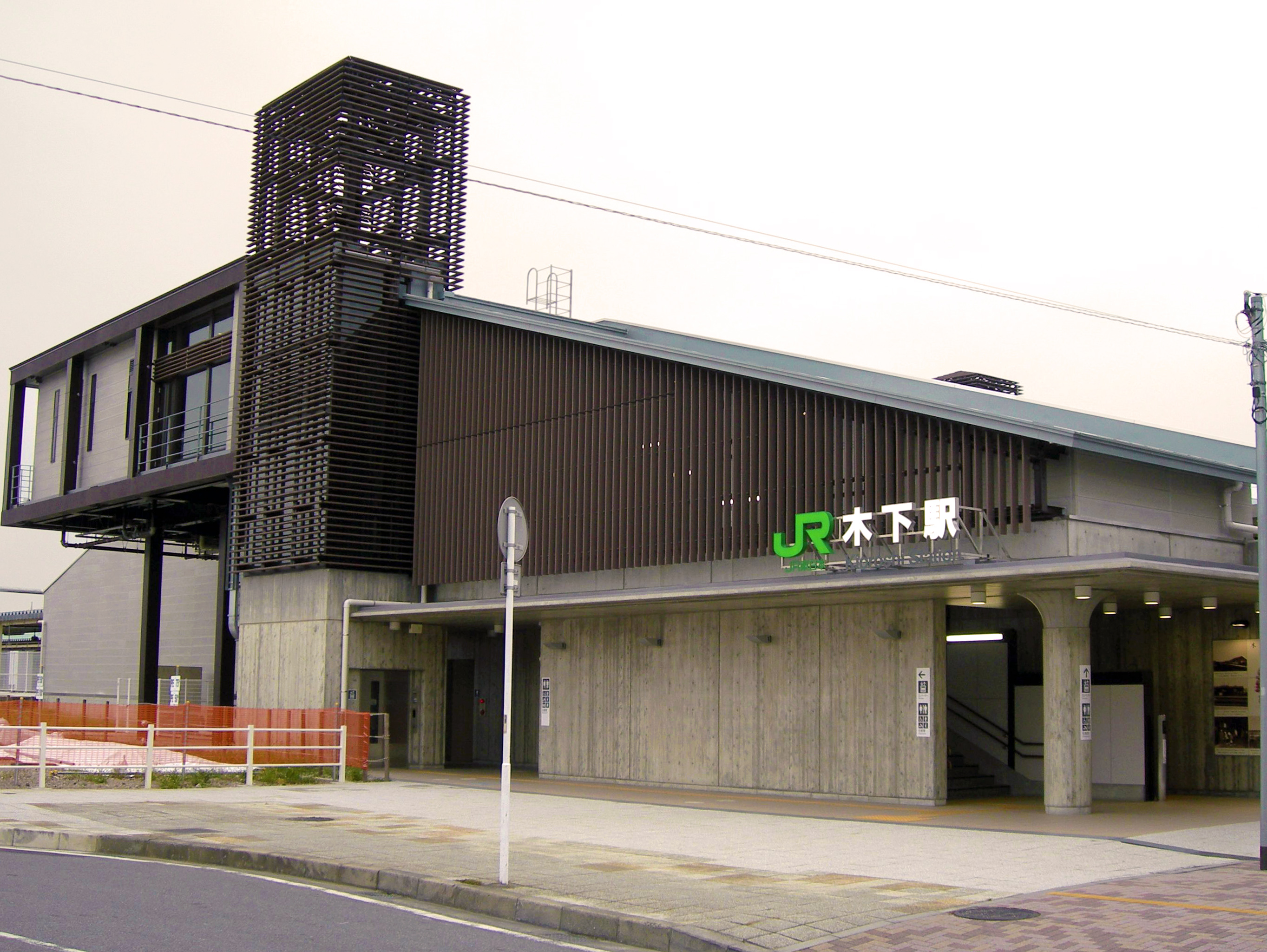 木下駅南口（cropped）